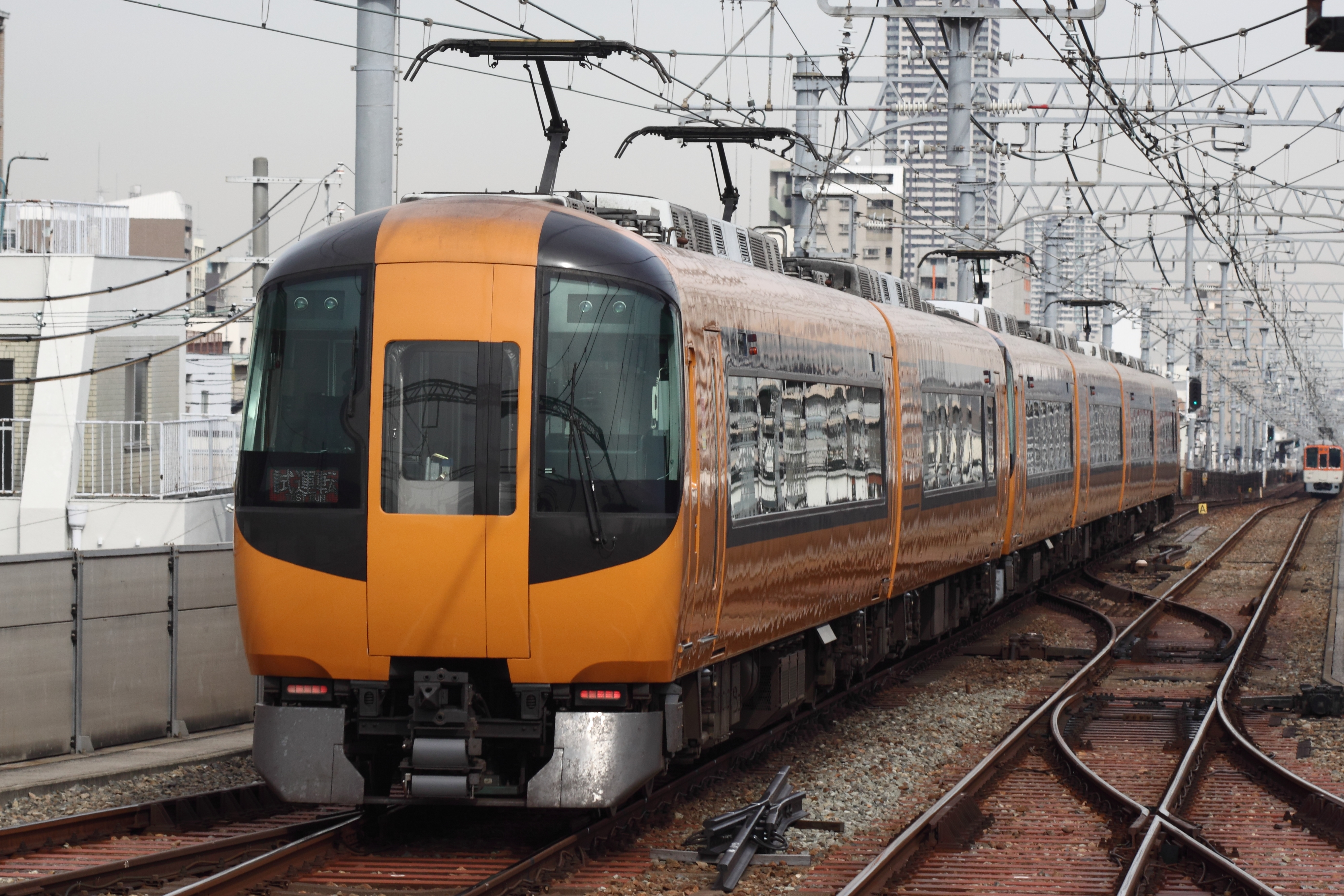 近鉄22600系 阪神線内での試運転 大石駅